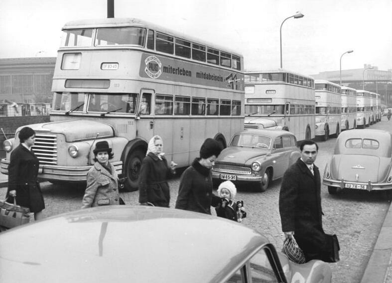 Zentralbild Spremberg 31.10.1964 Vertrag zum Passierscheinabkommen 1964 Auf der Weidendammbrücke... am Bahnhof Friedrichstrasse standen am Vormittag des 31. Oktober 1964 Autobusse der BVG in Bereitschaft. Sie wurden je nach Bedarf zur Beförderung der vielen Westberliner Bürger eingesetzt, die ihre Verwandten in der Hauptstadt der DDR besuchen.